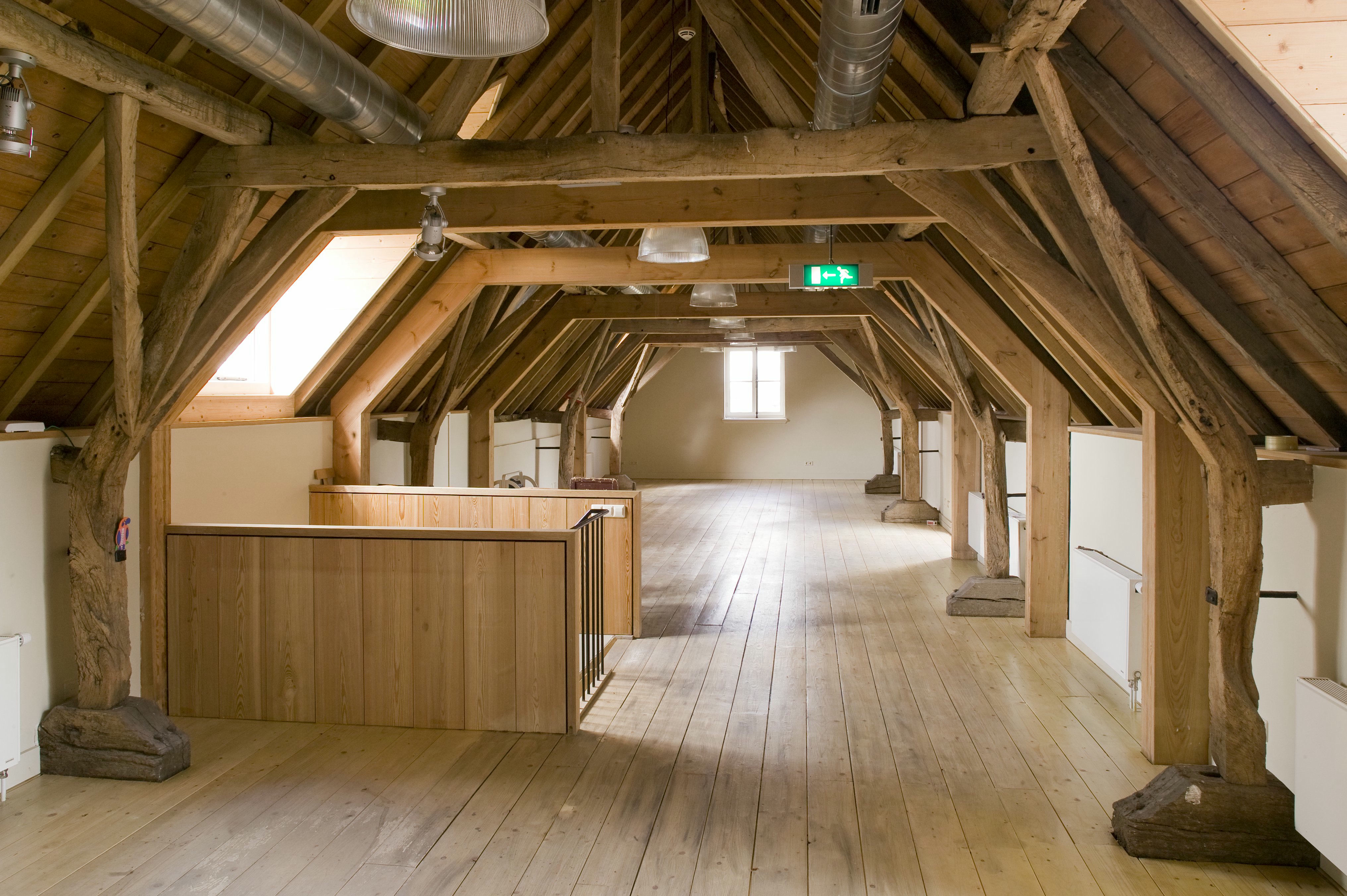 Kasteel Zwijnsbergen: Interieur koetshuis: overzicht verdieping met kapconstructie